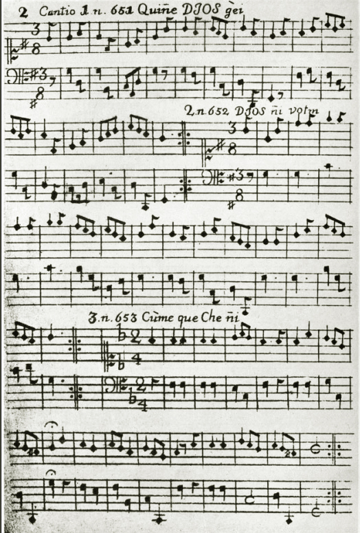 Chilidúgú, sive Res chilenses vel descriptio status tum naturalis, tum civilis, cum moralis Regni populique Chilensis inserta suis locis perfectæ ad Chilensem Limguam Manuductioni deo O.M. multis ac miris modis Juvante. Bernardi Havestadt. Lipsiae: Typis B. G. Teubneri, 1777. 3 t. en 2 v. El Cancionero Chilidugú consistía en 19 partituras que Bernardo de Havestadt incorporó en el volumen 2 de su obra Chilidúgú, sive tractatus linguae Chilensis, publicada en Münster en 1777. La letra de las canciones, un completo compendio de los principios de la fe católica adaptada a la lengua mapuche, se encuentra entre las páginas 582 y 586 del volumen 1 de la misma obra. La grabación El cancionero chilidugu del Padre Havestadt: Música en las misiones Jesuitas de la Araucanía en el siglo XVIII es el resultado de una investigación musicológica llevada a cabo por Víctor Rondón y está interpretada por el conjunto Sintagma Musicum de la Universidad de Santiago junto al Coro de Niños de la Comunidad Huilliche de Chiloé.